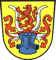 Wappen von Niedenstein